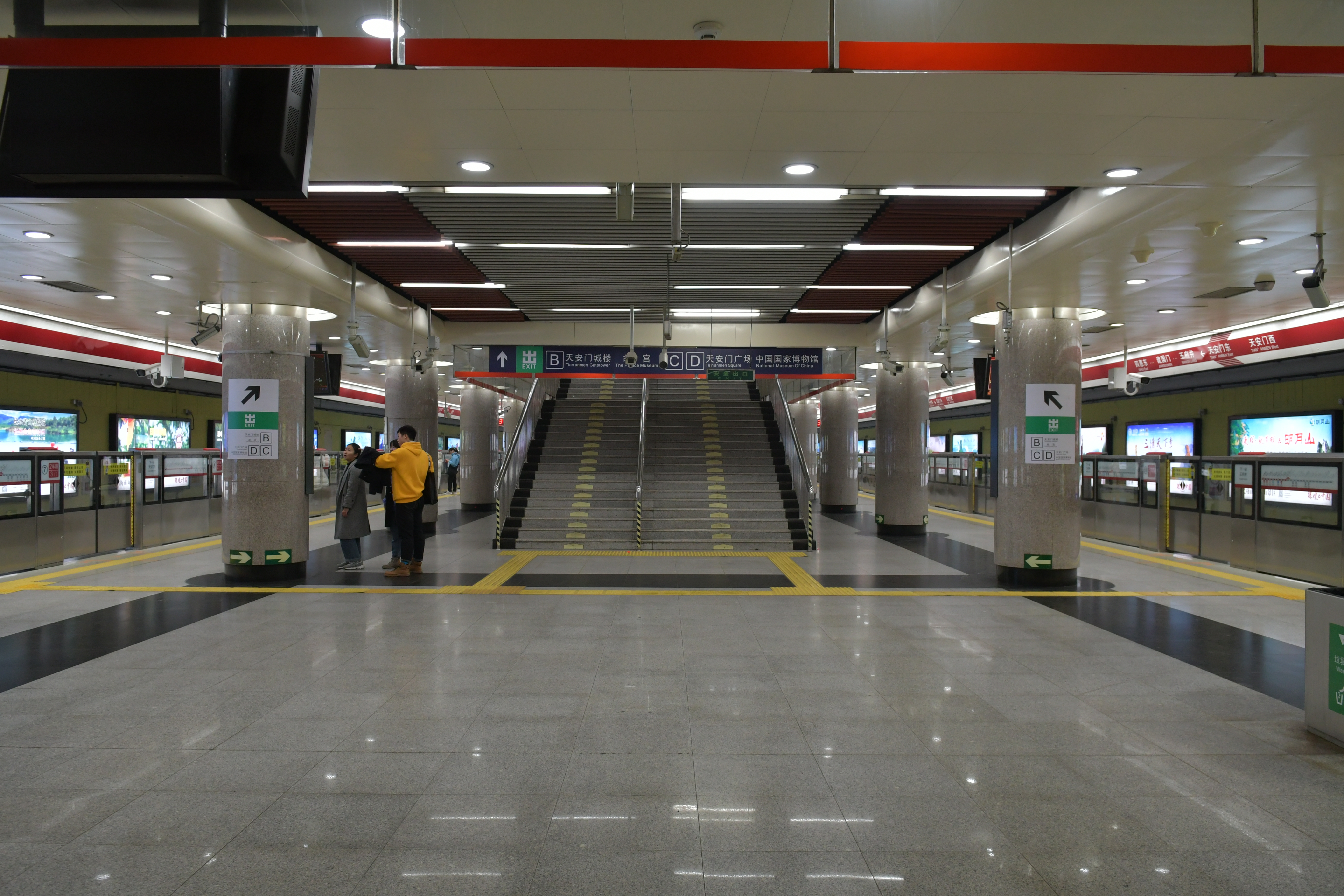 北京地铁1号线天安门东站岛式站台。站台加装半高式屏蔽门，2017年投入使用。